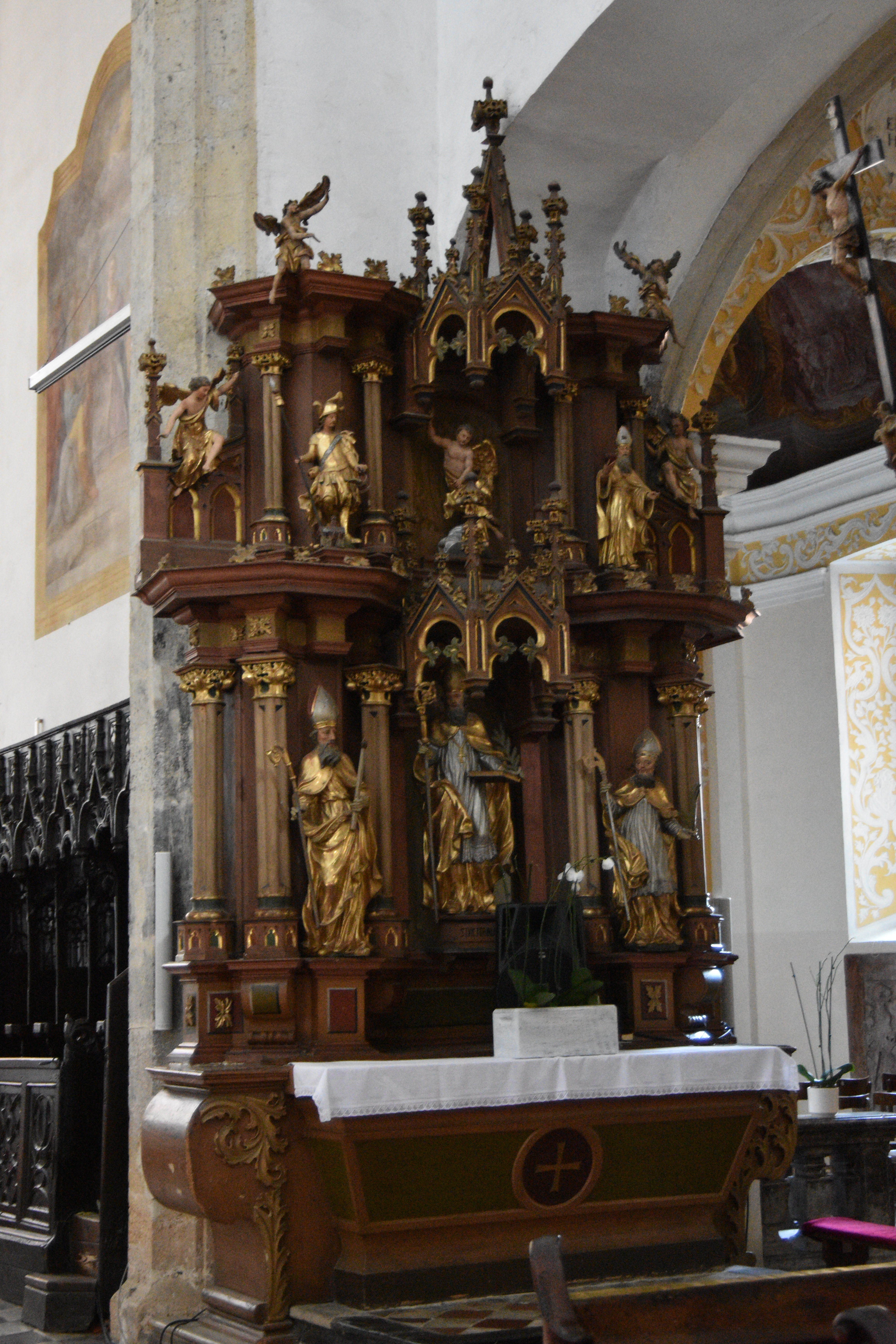 Interior of St. George's Parish Church Ptuj